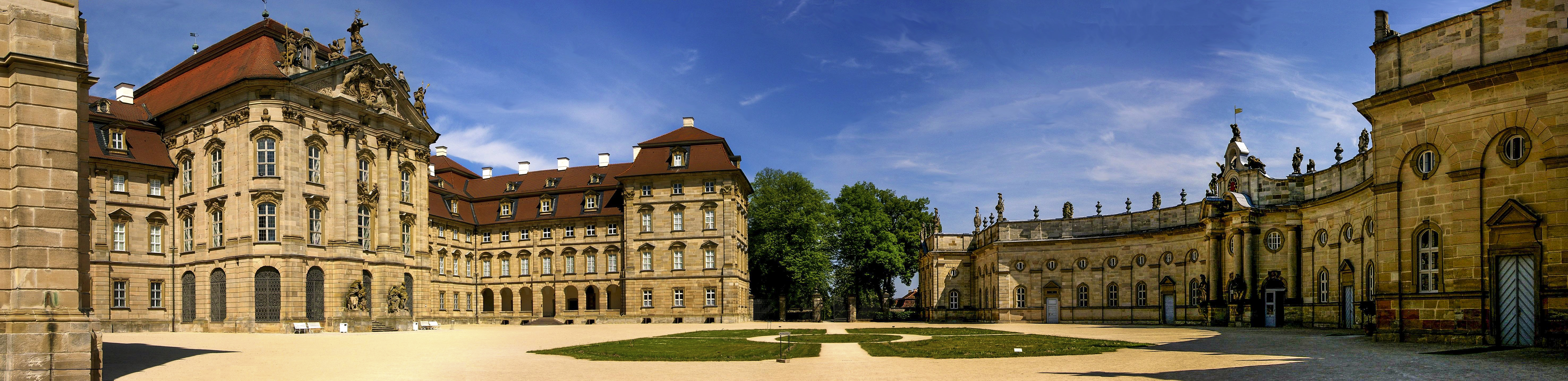 Pommersfelden-Schloss Weißenstein-Innenhof